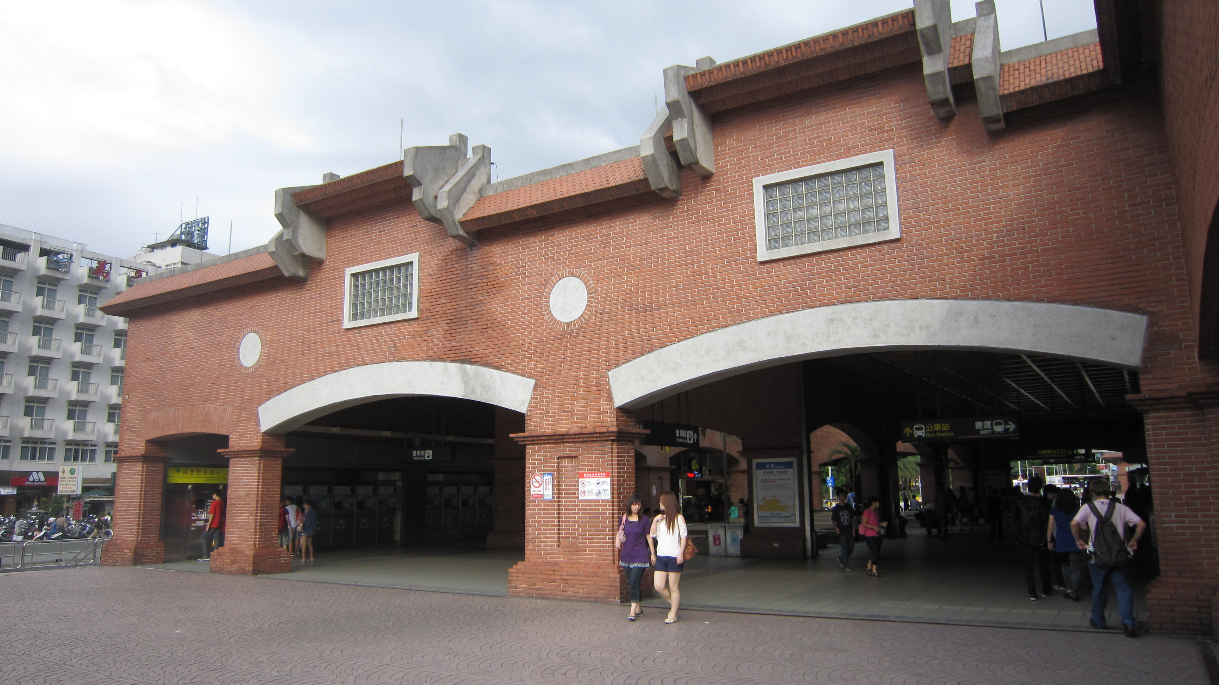 Tamsui MRT 淡水捷運站